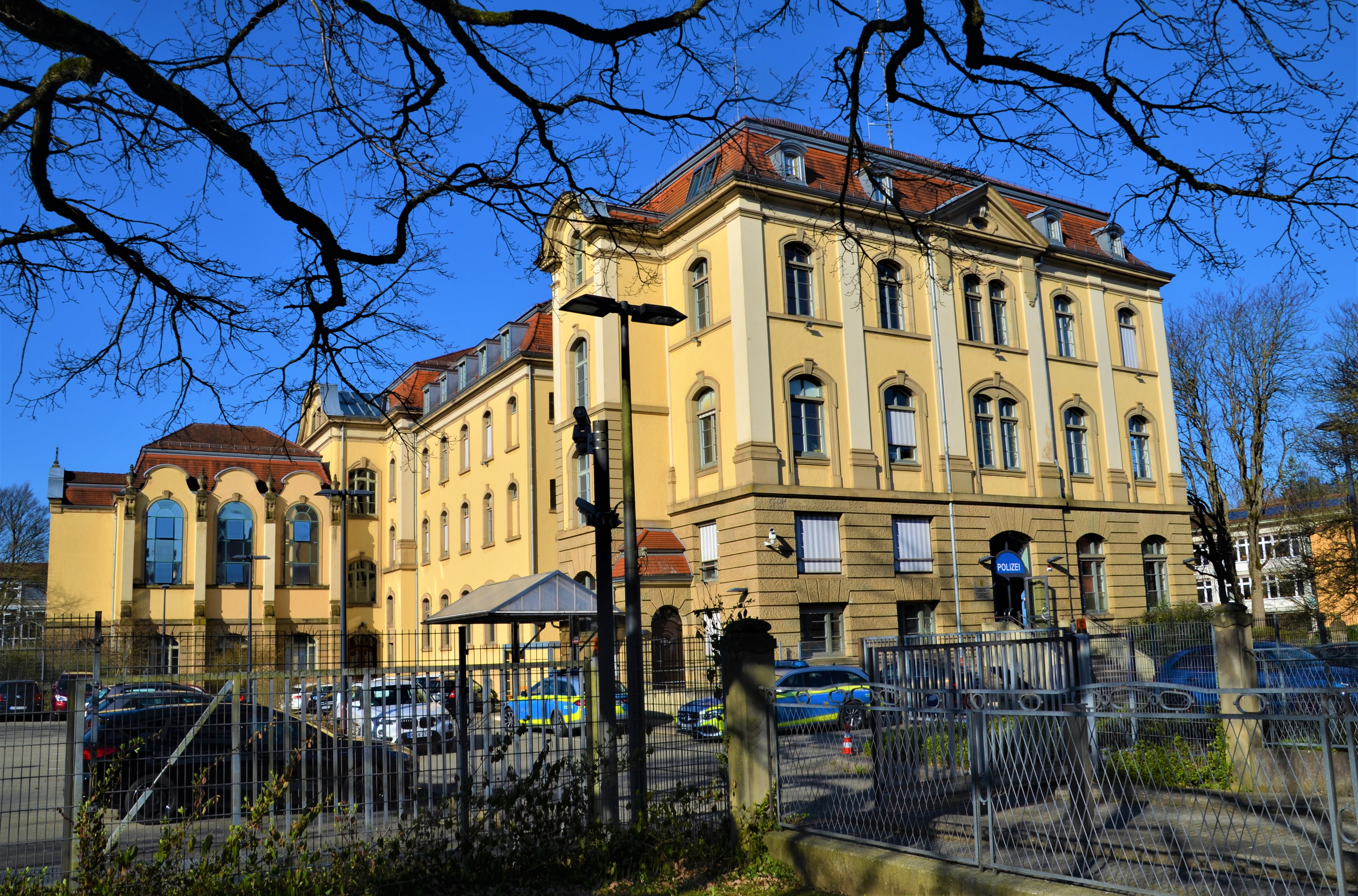 Polizeirevier Schwäbisch Gmünd in der Alten PH von Osten